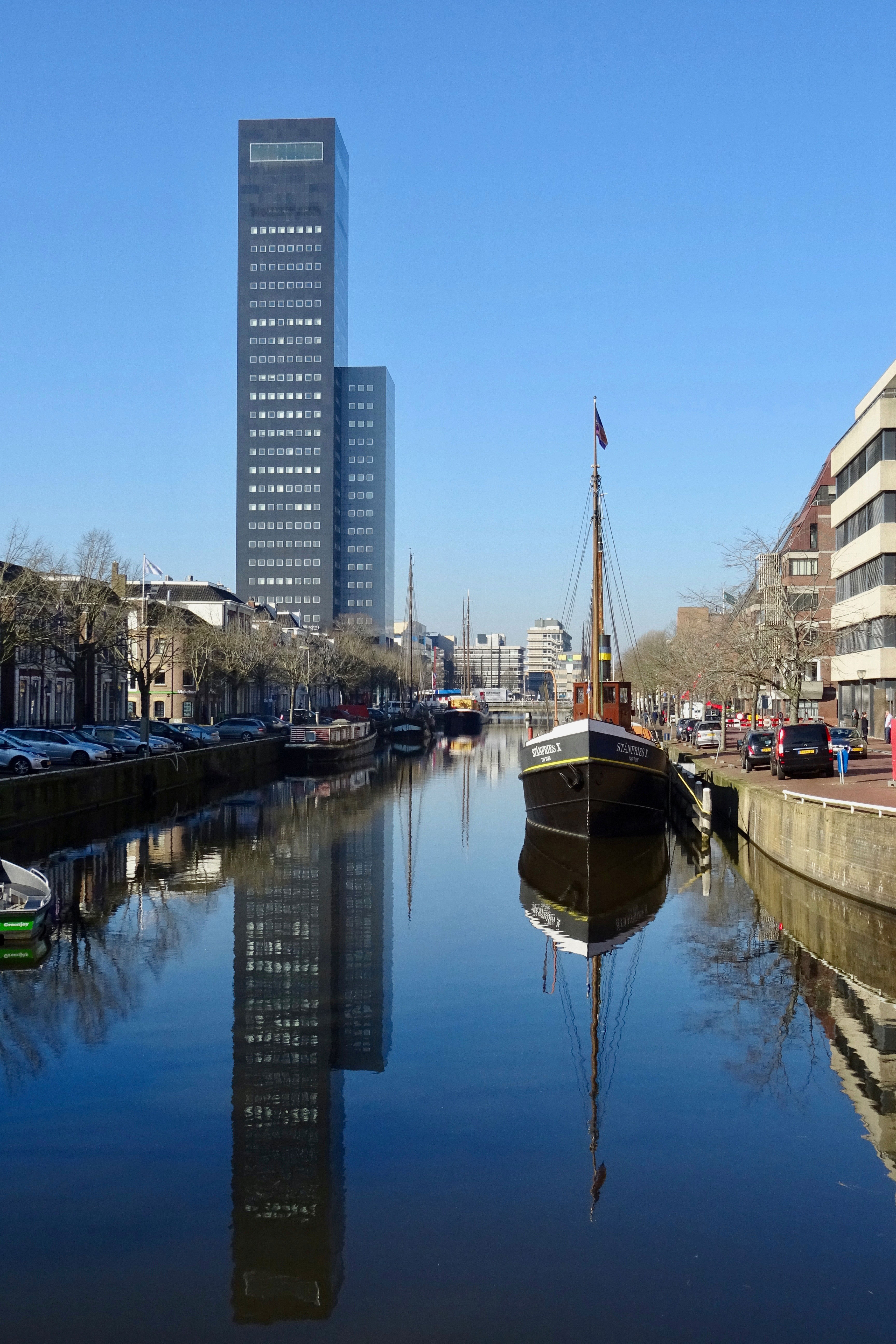 Willemskade met zicht op de Achmeatoren en de Stânfries X in Leeuwarden